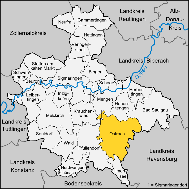 Karte der Gemeinde Ostrach im Landkreis Sigmaringen